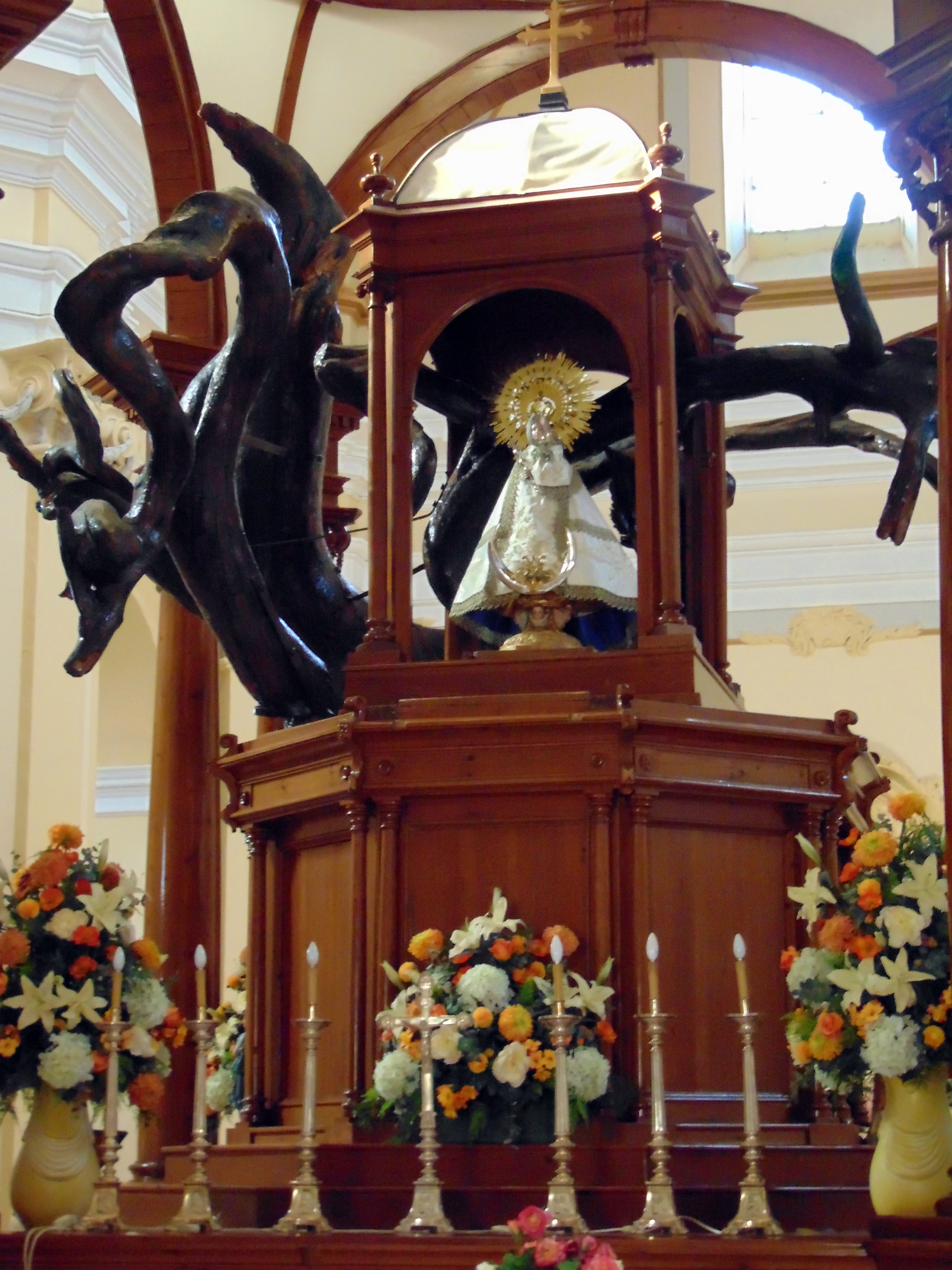 Ermita de la Mare de Déu de Hornuez (Moral de Hornuez, Segovia).